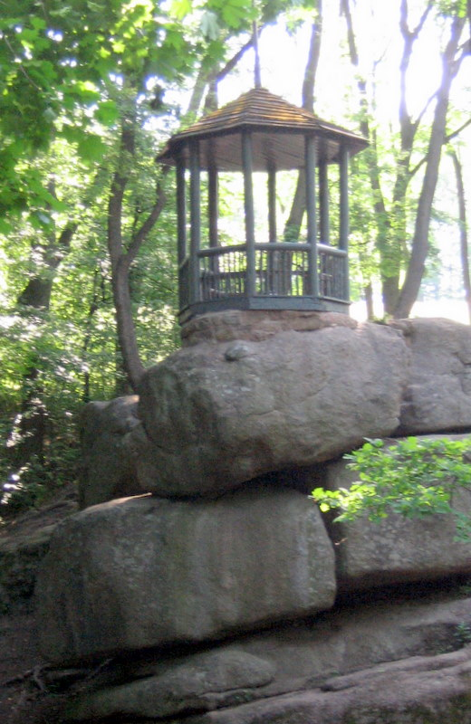 Der künstliche Tarpejische Felsen, benannt nach römischem Vorbild.